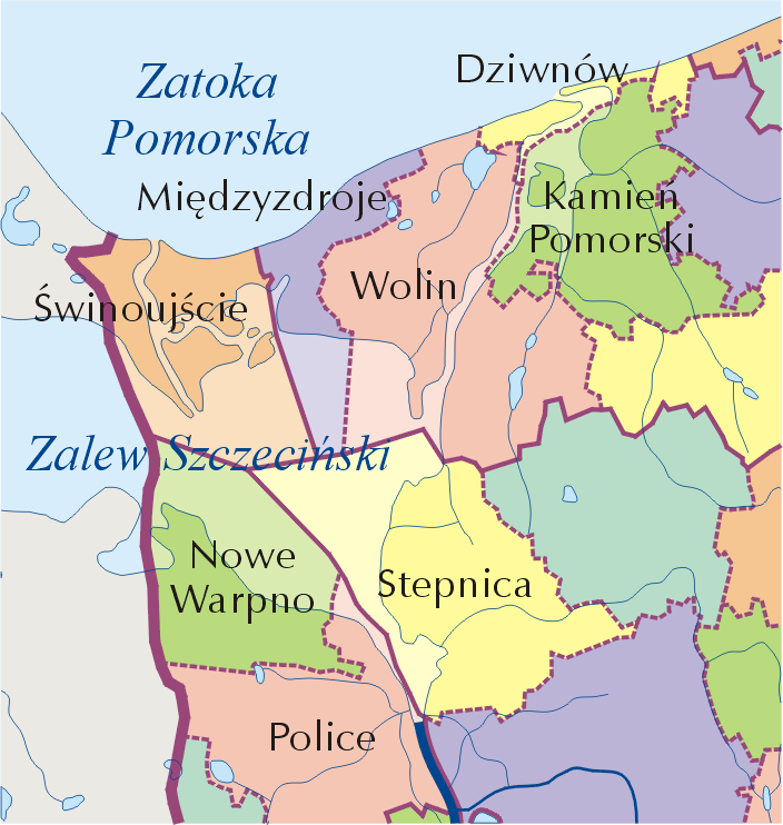 Mapa podziału administracyjnego Zalewu Szczecińskiego i wód przyległych. Autor: Aotearoa